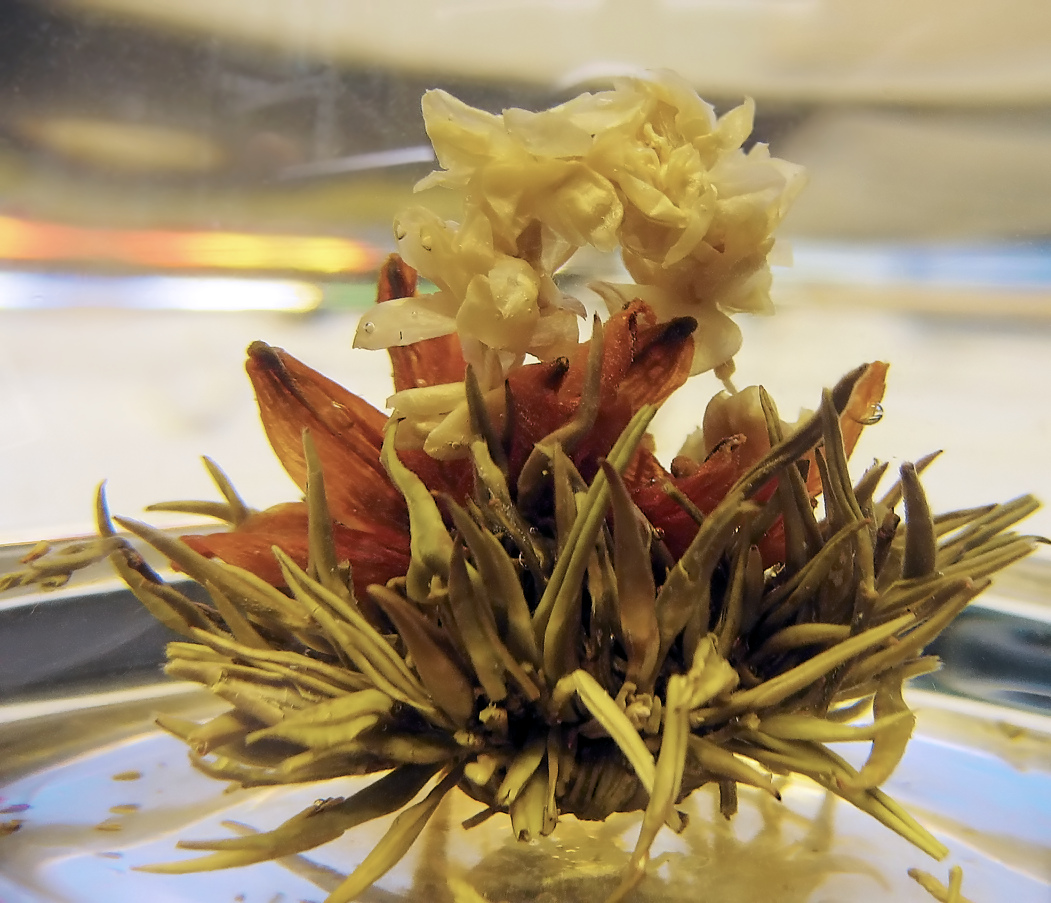 Teerose mit Blüte